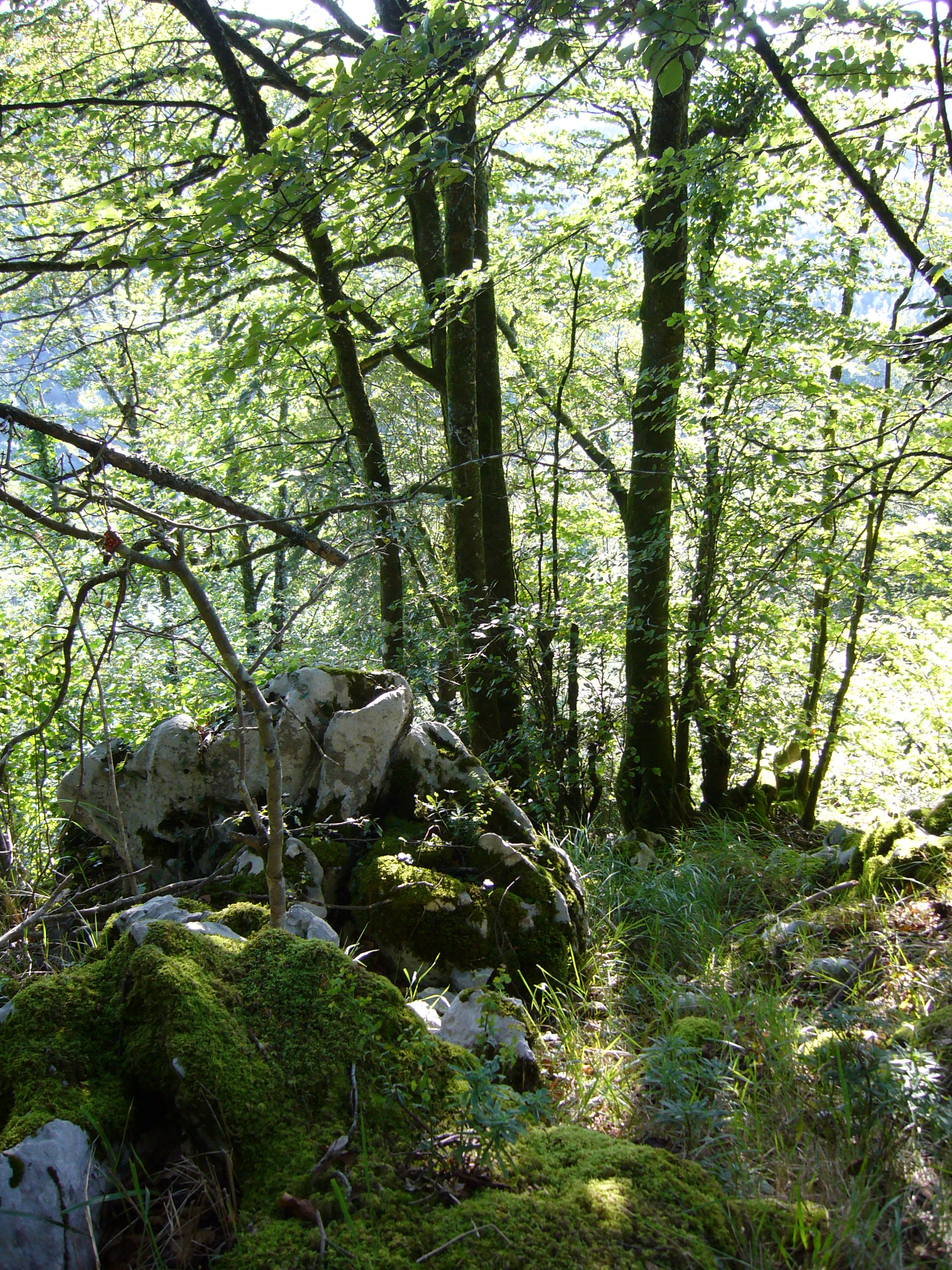 Basajaun haitza basoa, basajaunen bizitokia.